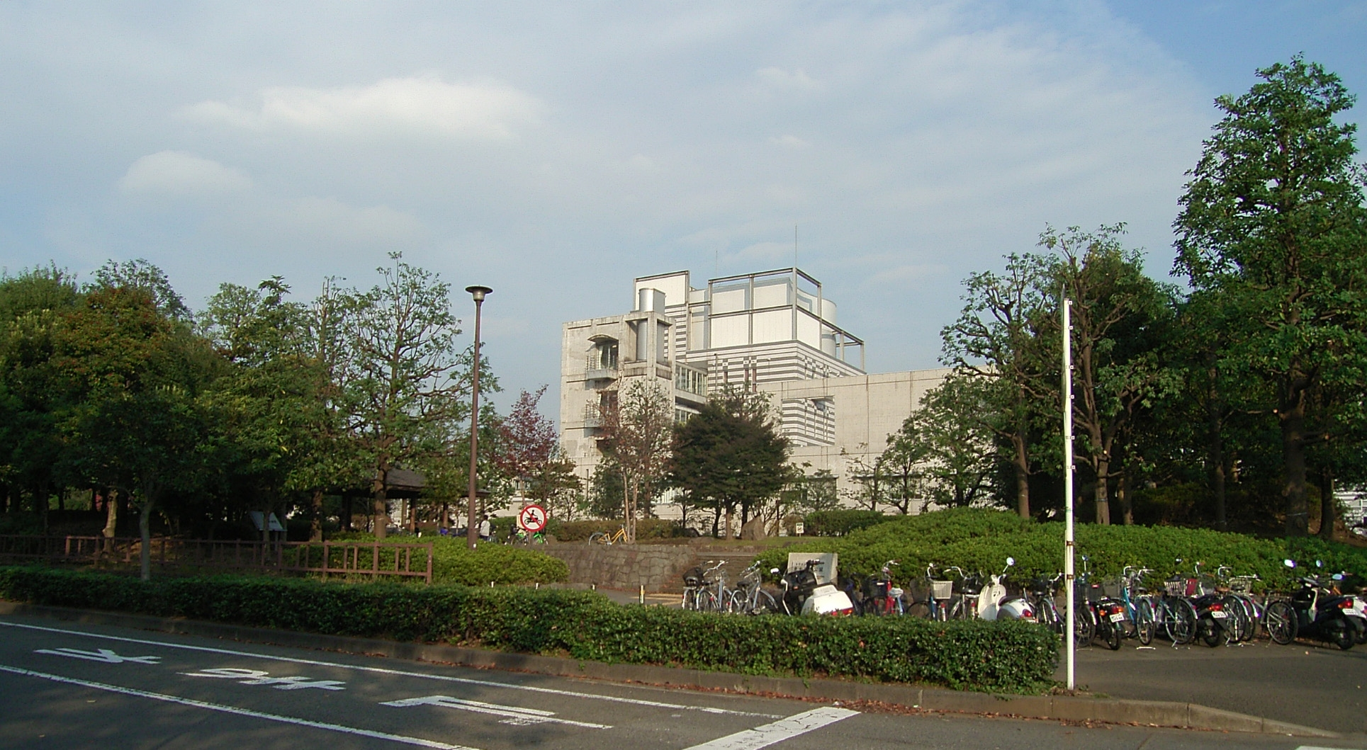 Higashiyamato-Southpark 都立東大和南公園 東京都東大和市桜が丘